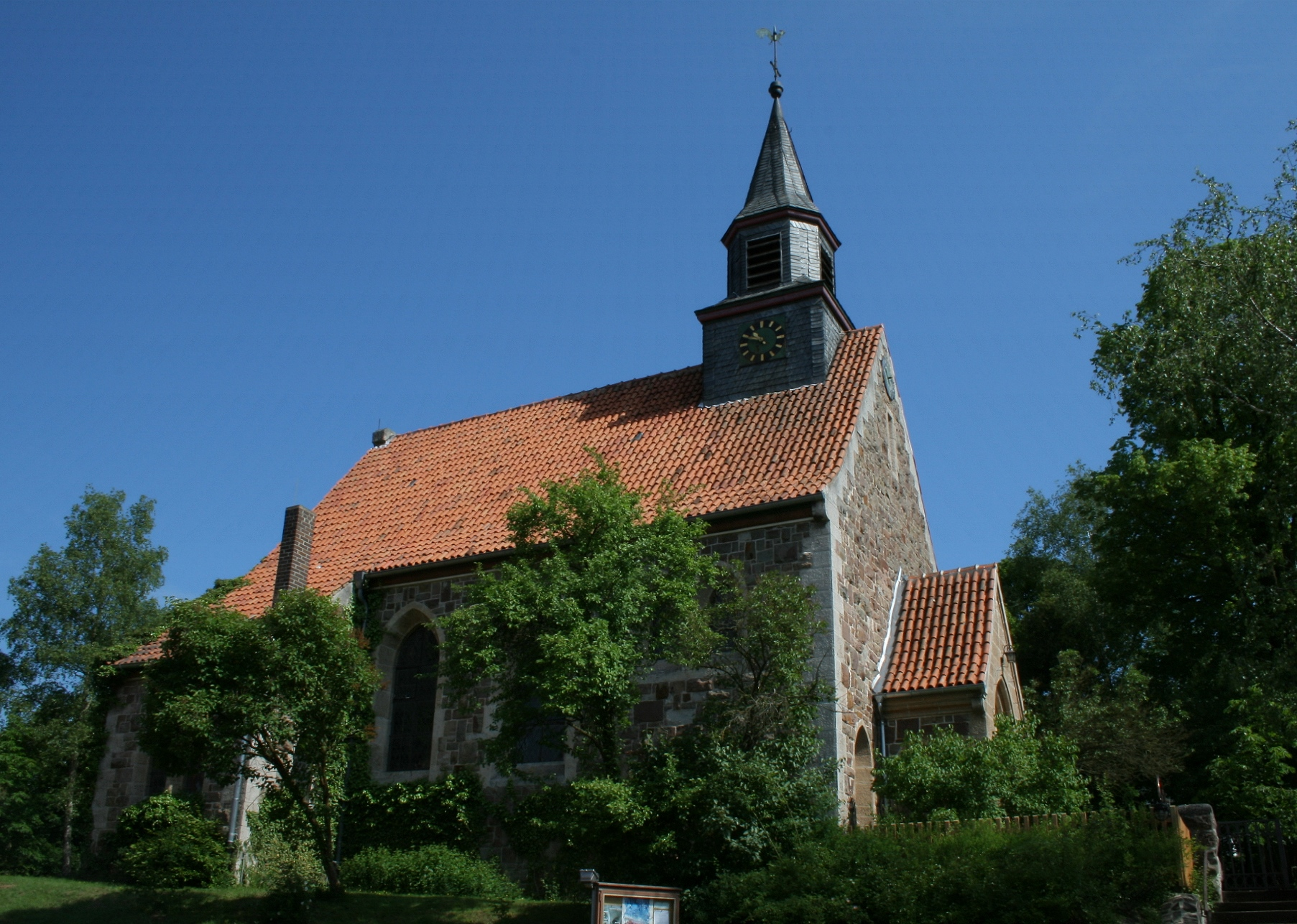 Evangelische Dorfkirche Nieder-Werbe. Erbaut 1914 im Stil der wilhelminischen Kaiserzeit.